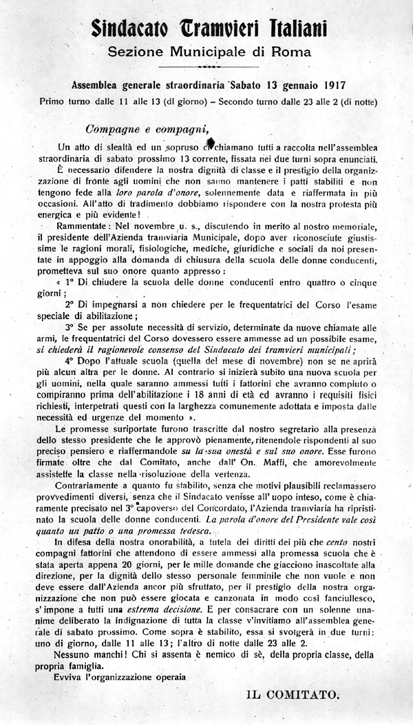 Sciopero tranvieri